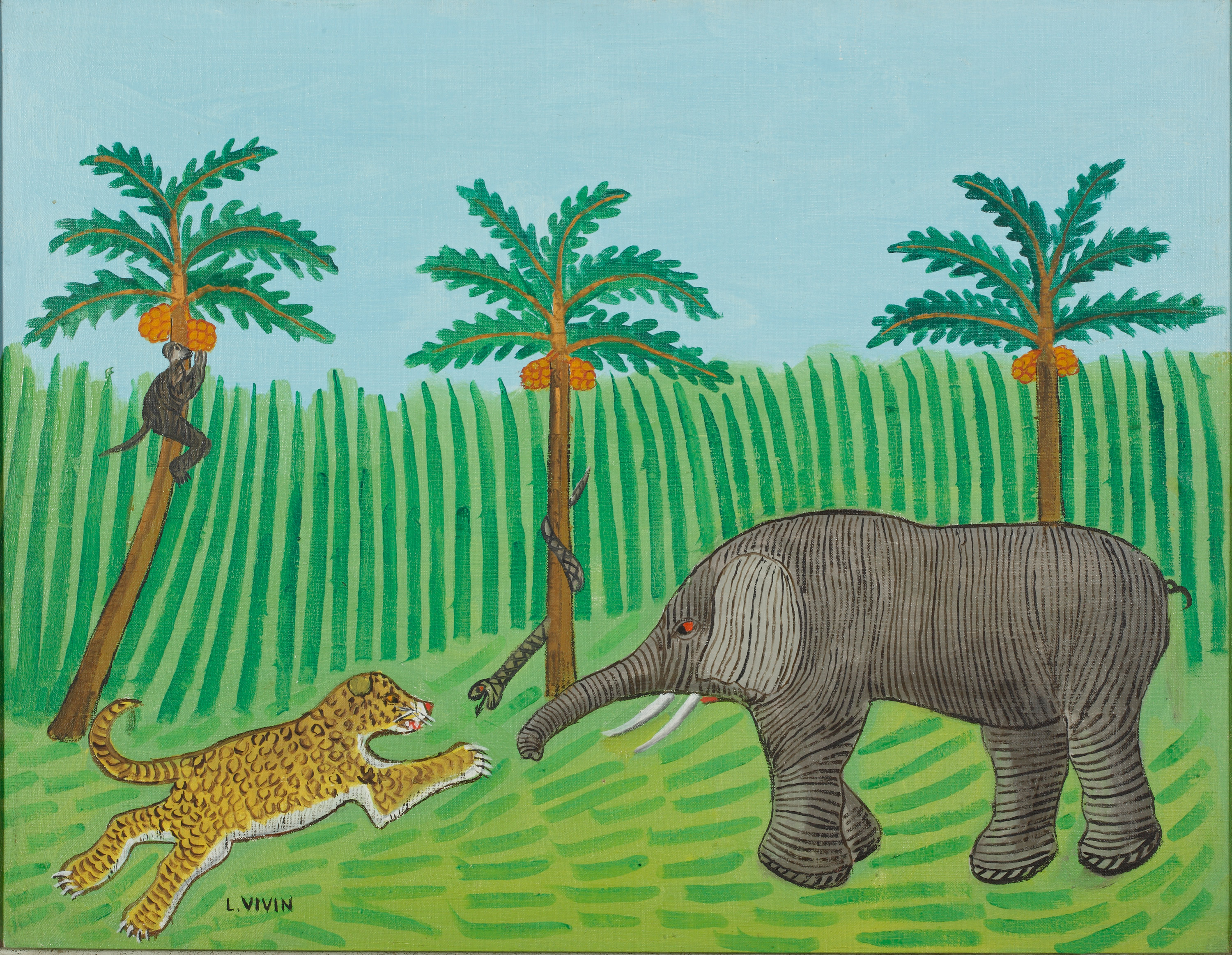 Gemälde aus dem Sammlungsschwerpunkt Naive im Kunstmuseum Thurgau, Kartause Ittingen